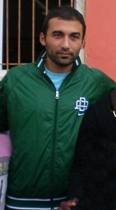 Turgay Gölbaşı'nın Samsun'da Okuyorum; Samsunspor'u Tutuyorum III etkinliğinde çekilmiş bir fotoğrafı.